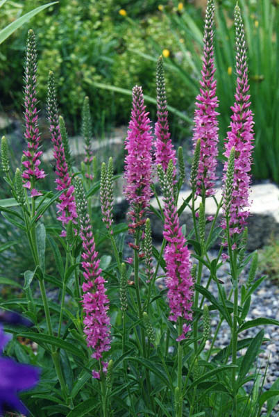 Veronica spicata 'Rosea'